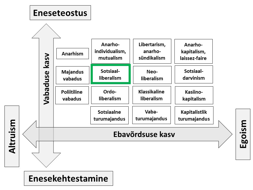 Sotsiaalliberalism sotsiaalse korra mudelis